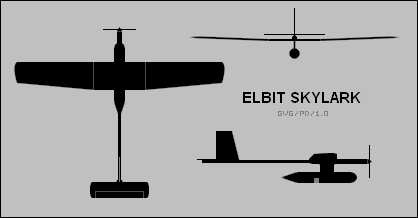 Skylark 1 3-view drawing